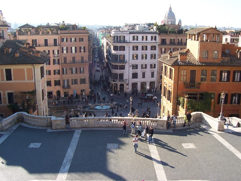 Roma - Via Condotti vista dalla scalinata di Trinità dei Monti